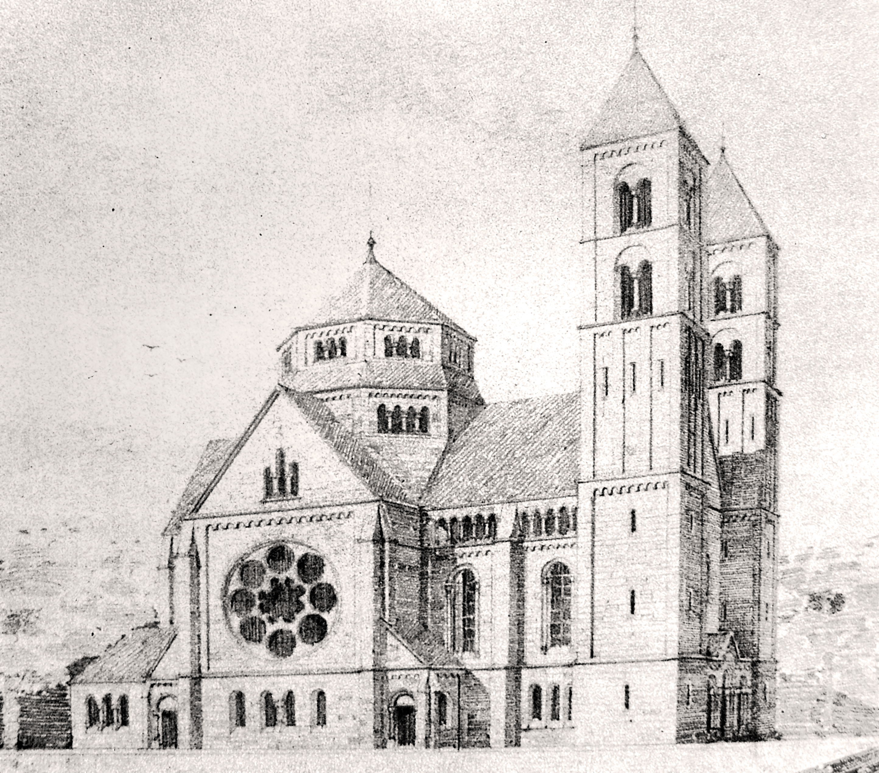 Evangelische Stadtkirche Metz (Temple Neuf (Metz)), Vorentwurf, Plansammlung 9 Fi 598, Archives municipales de Metz